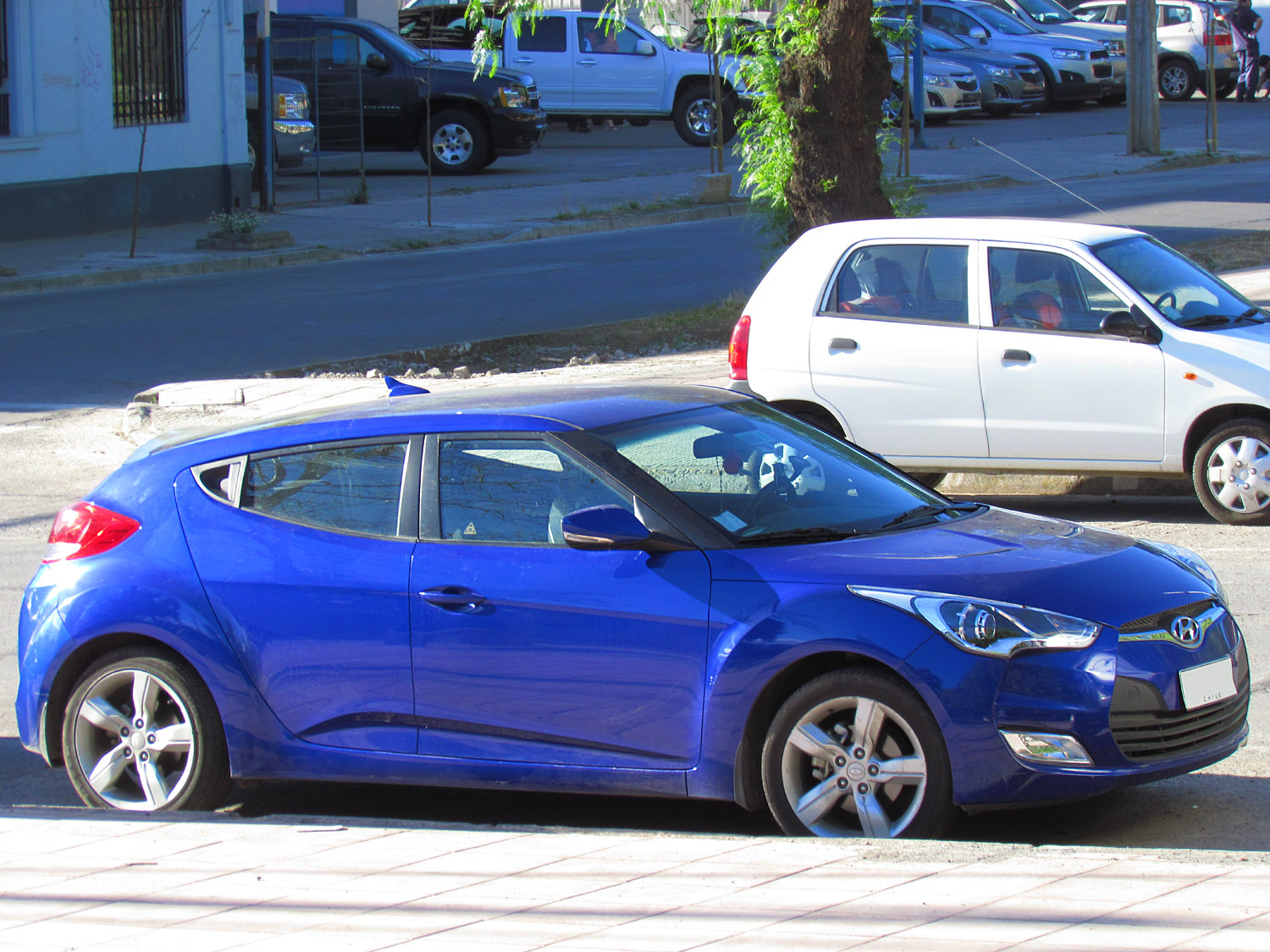 Hyundai Veloster 1.6 GLS 2012